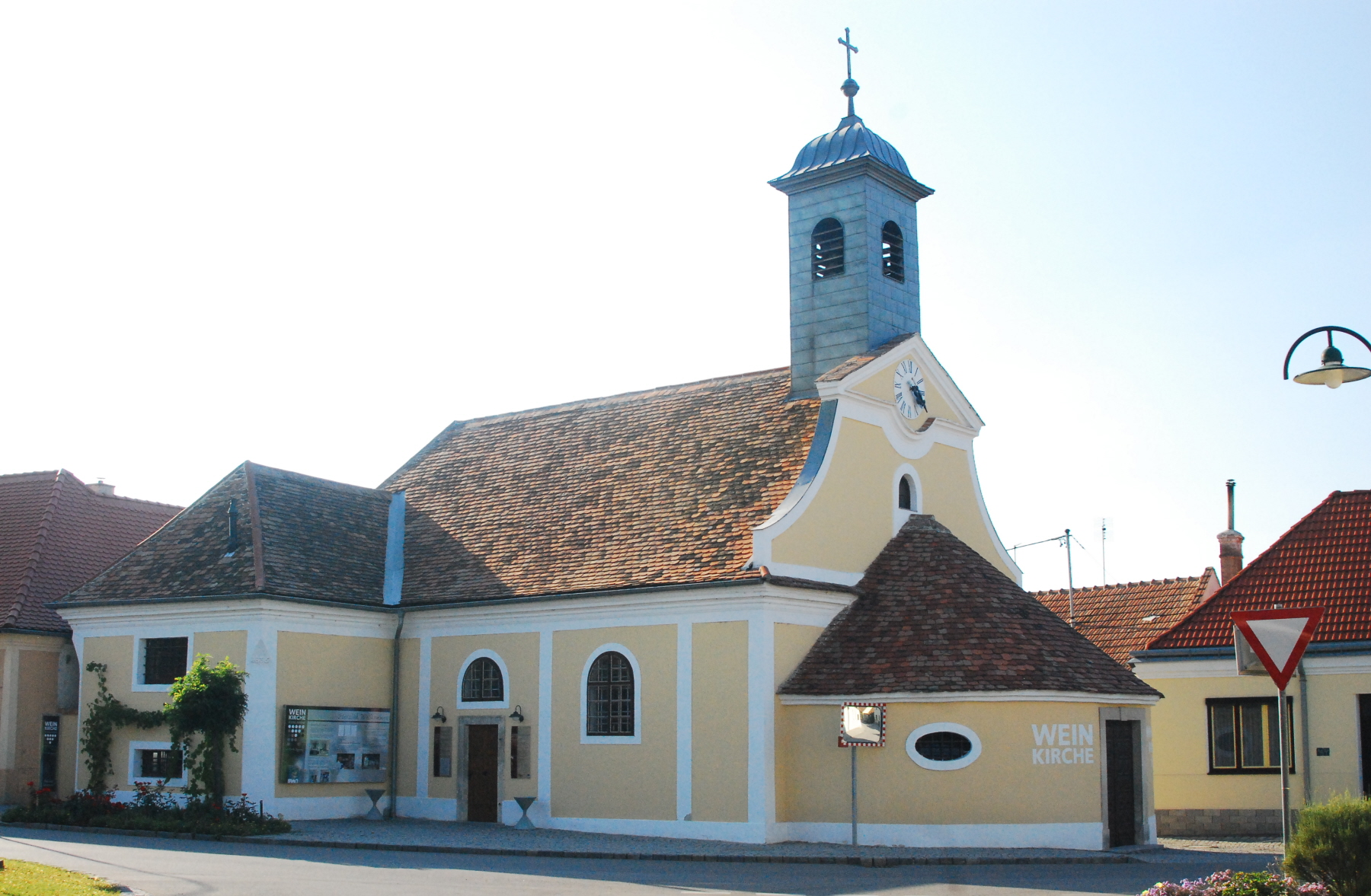 ehemalige Pfarrkirche heilige Maria